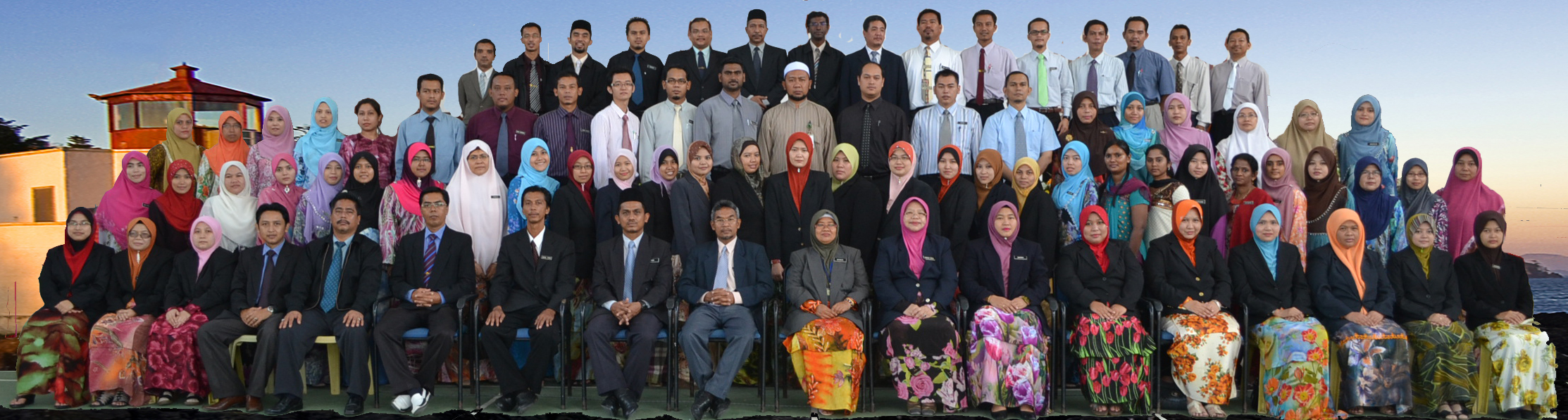 Gambar Cikgu Lui Barat 2011